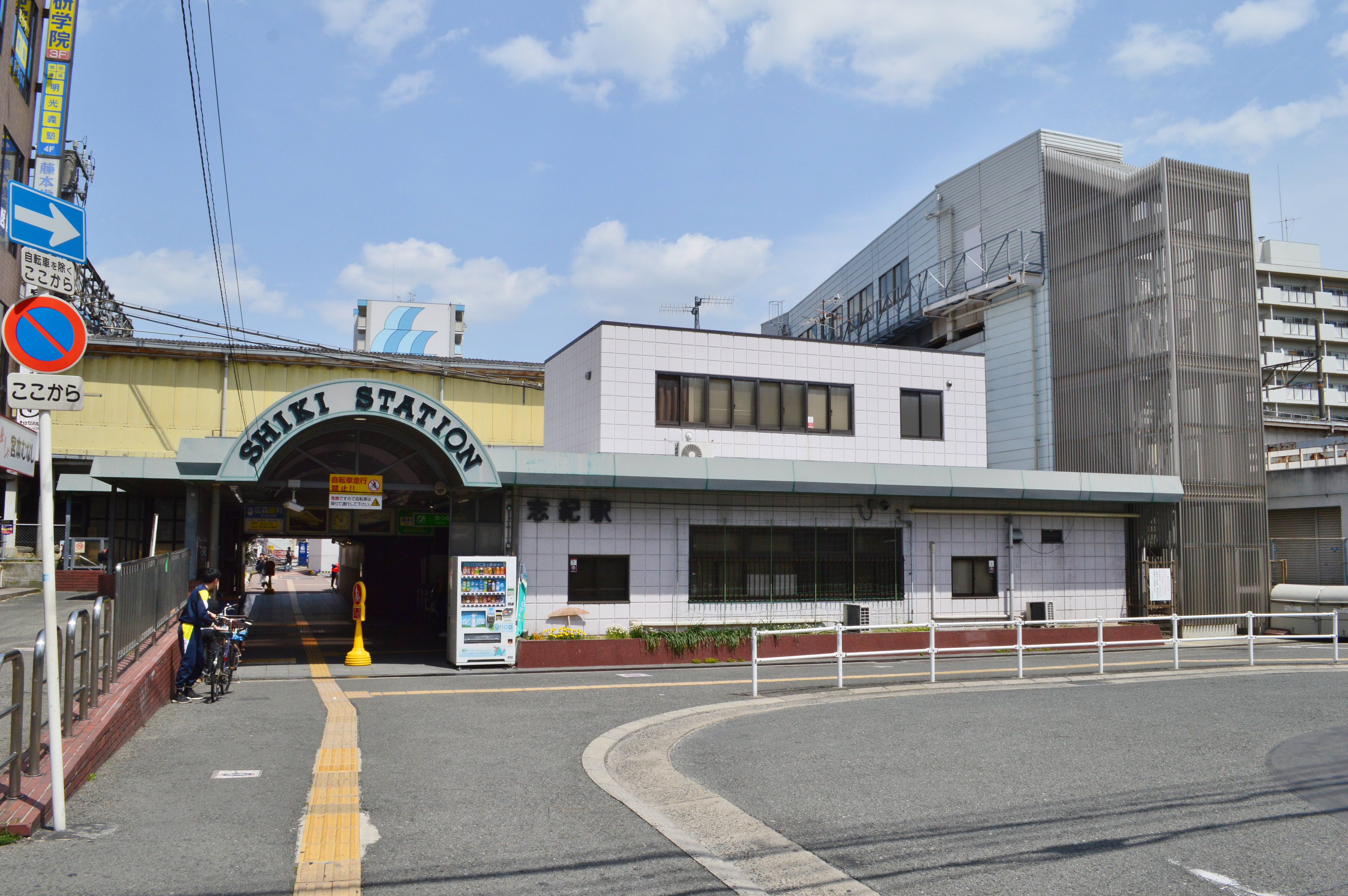 志紀駅 駅舎